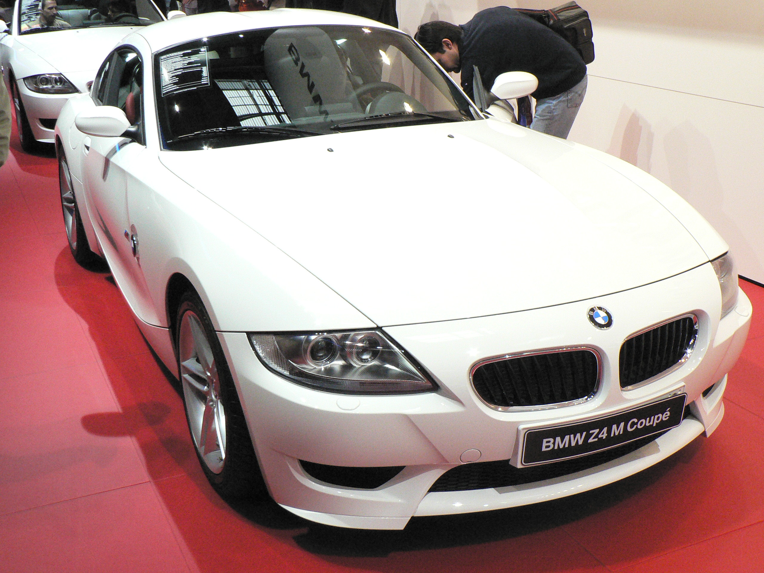 Mondial de l automobile de Paris (October 2006)